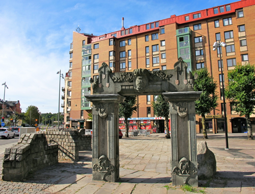 Sveaplan i Göteborg